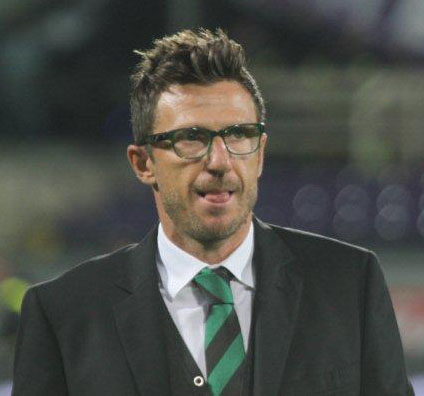 Eusebio Luca Di Francesco (Pescara, 8 settembre 1969) è un allenatore di calcio ed ex calciatore italiano, di ruolo centrocampista, nel 2014 allenatore del Sassuolo.